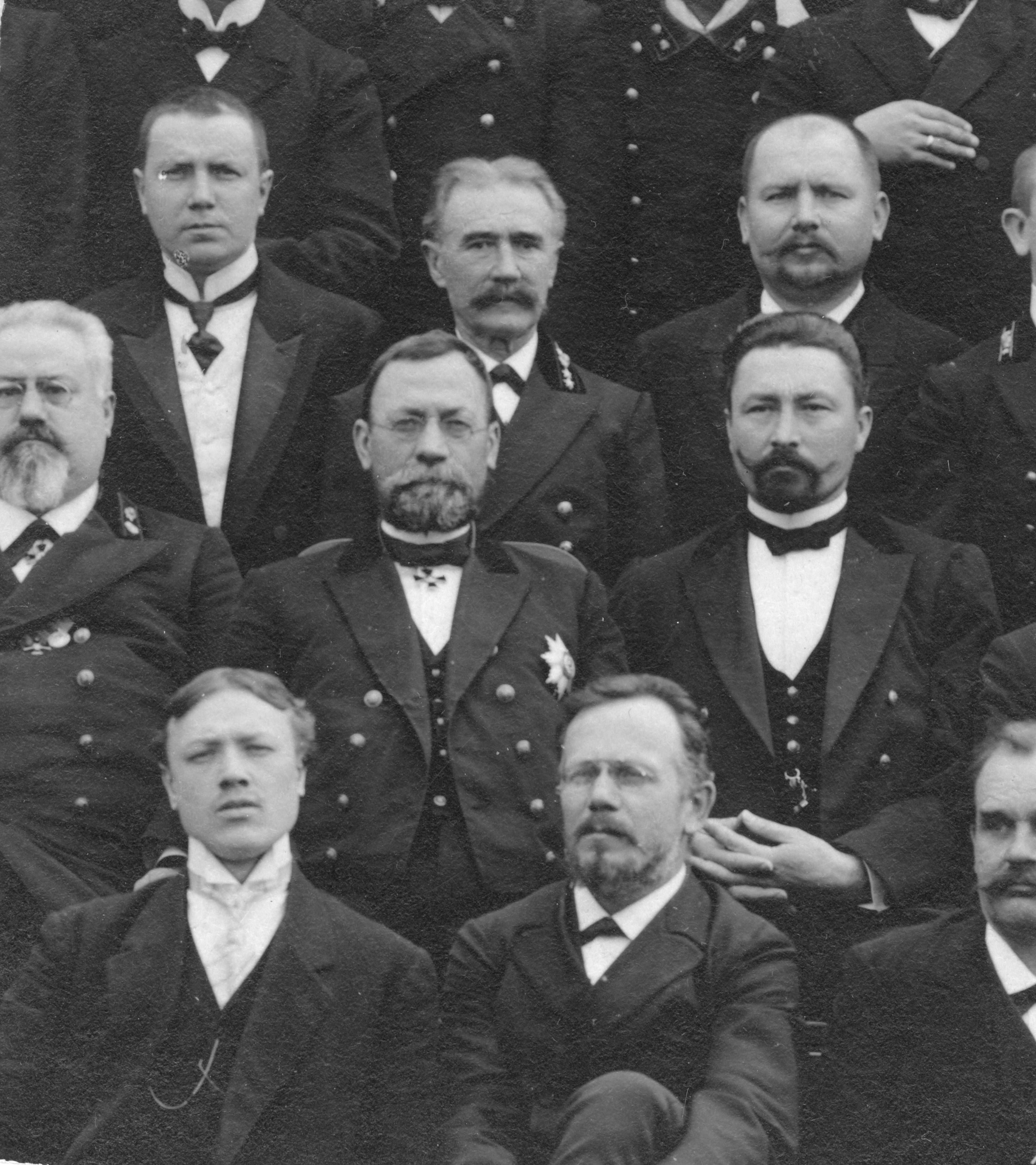 Личный состав Минской Казенной палаты на 1912 год (Ястремский в центре)